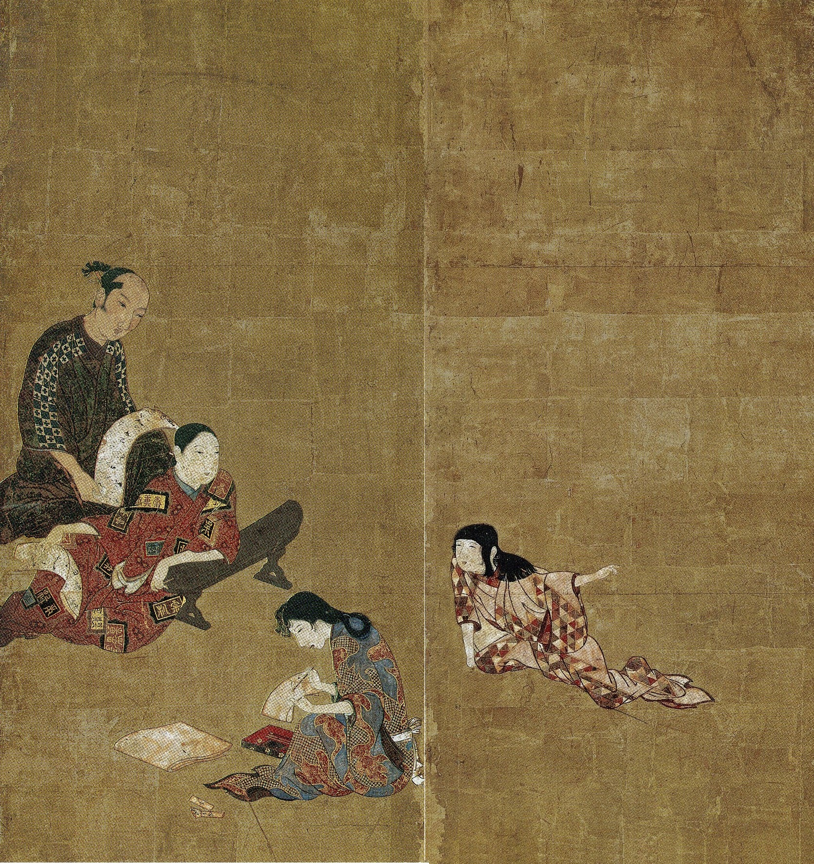 Hikone screen 3 and 4